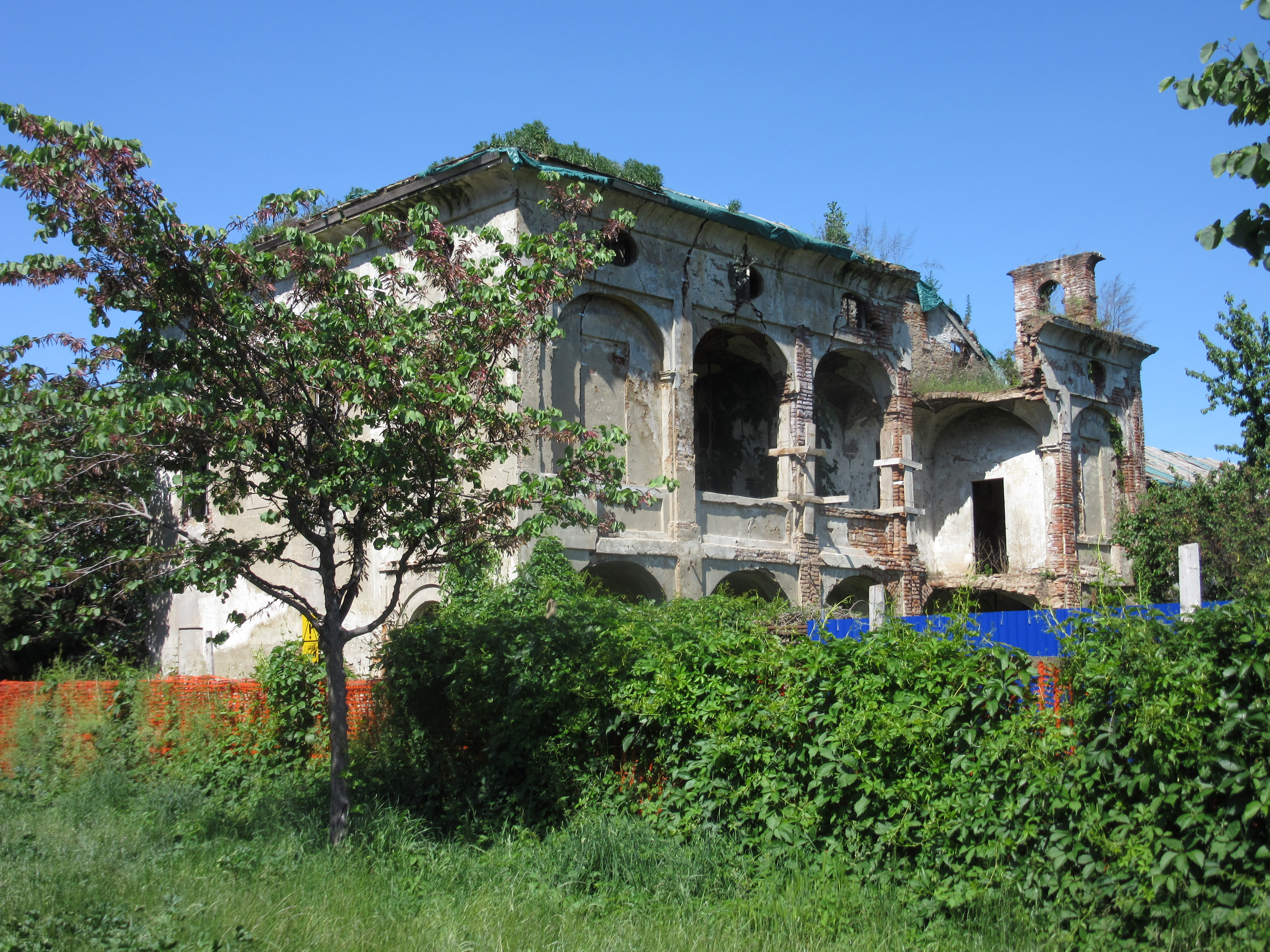 Torino, cascina Fossata, edificio padronale di epoca barocca (da via Randaccio). Foto eseguita a maggio del 2016 prima dell'avvio dei restauri.